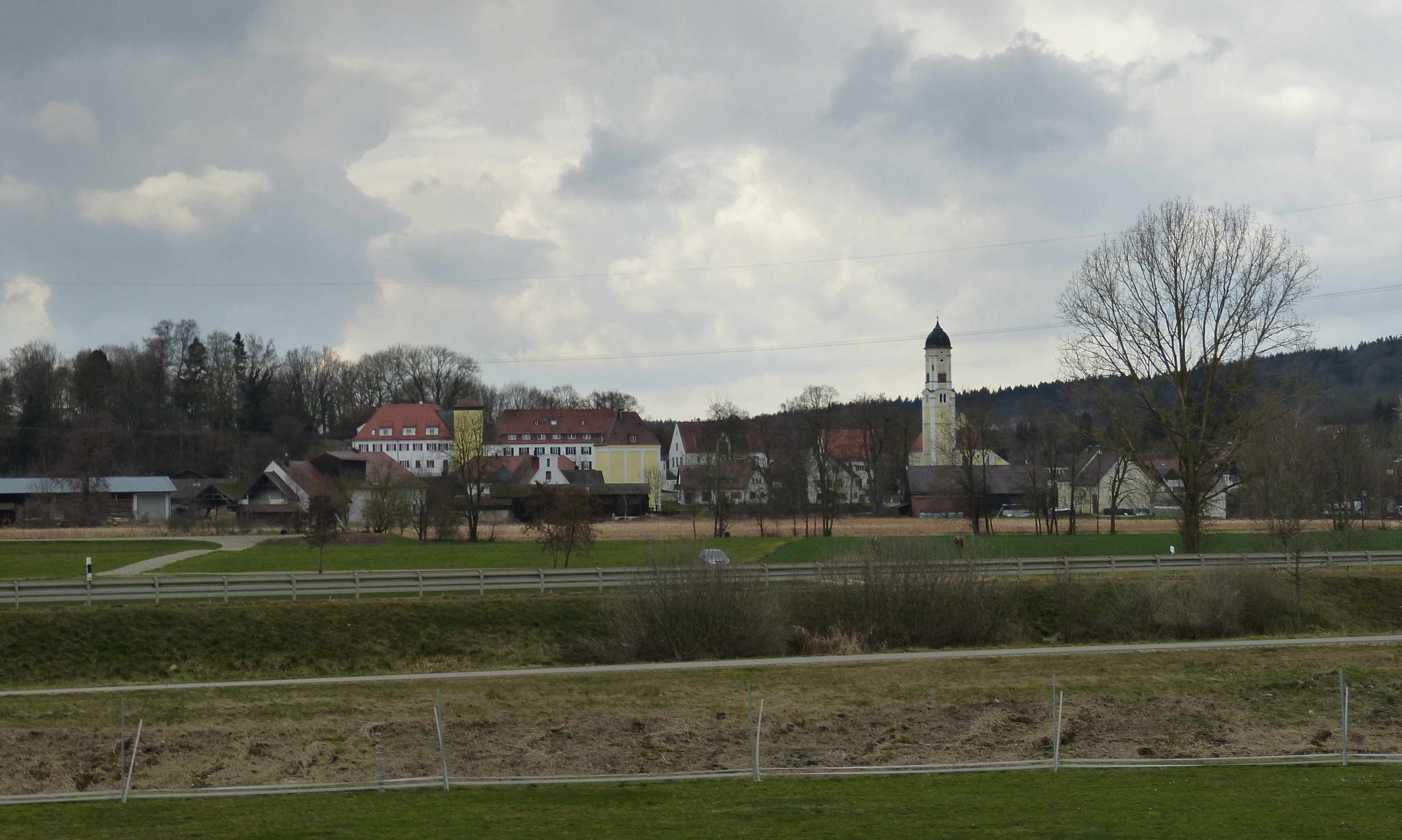 Batzenhofen, von Osten aus gesehen.